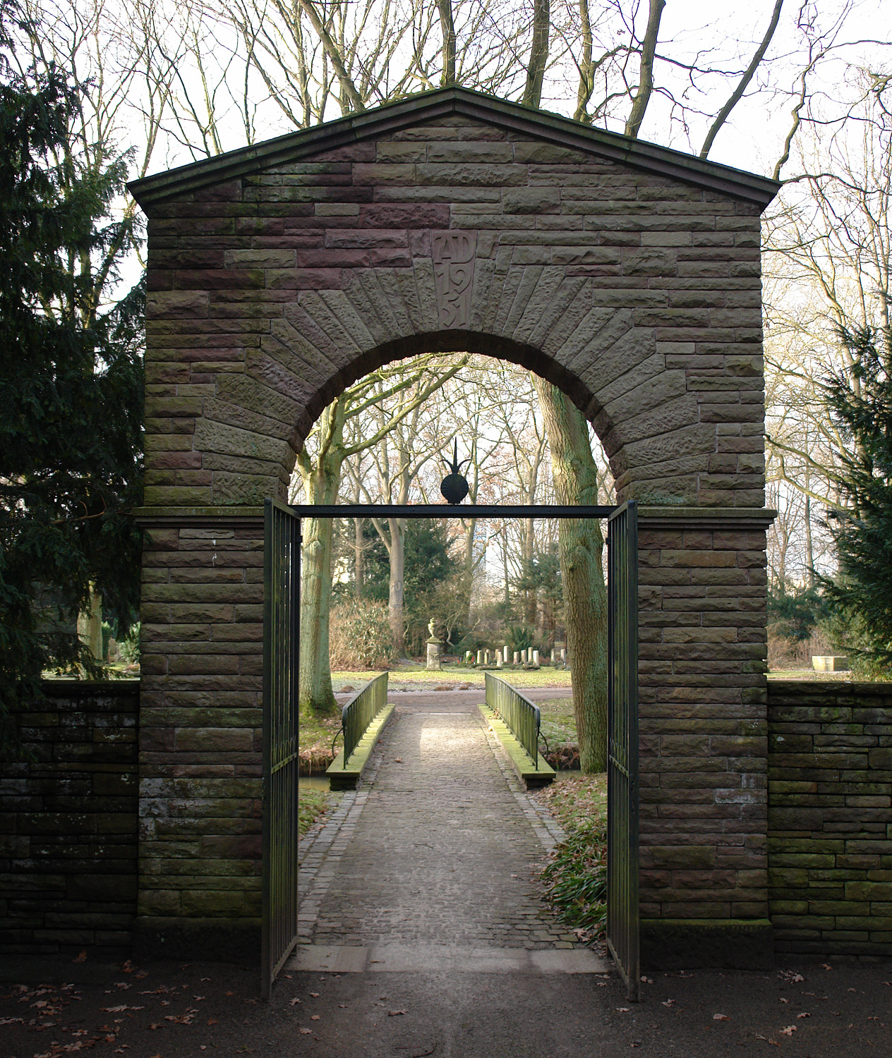 Osterholzer Friedhof in Bremen: Pforte bei den Ehrenanlagen für Niederländer / für Ausländer (Blick Richtung Westen)